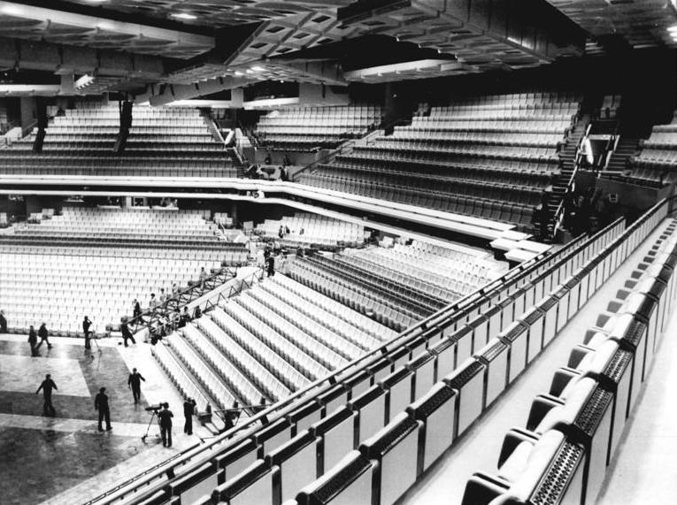 ADN-ZB Junge-21-4-76 Berlin: Palast der Republik-Blick in den Großen Saal.